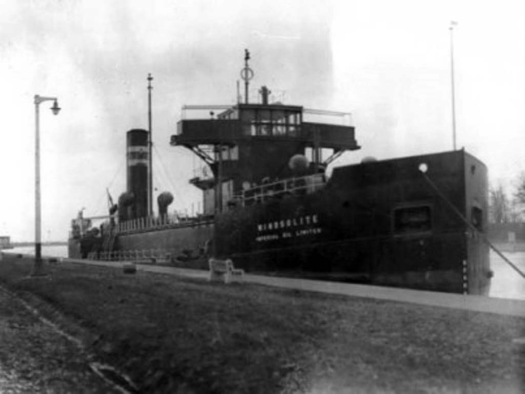 Windsolite, a small great lakes freigner